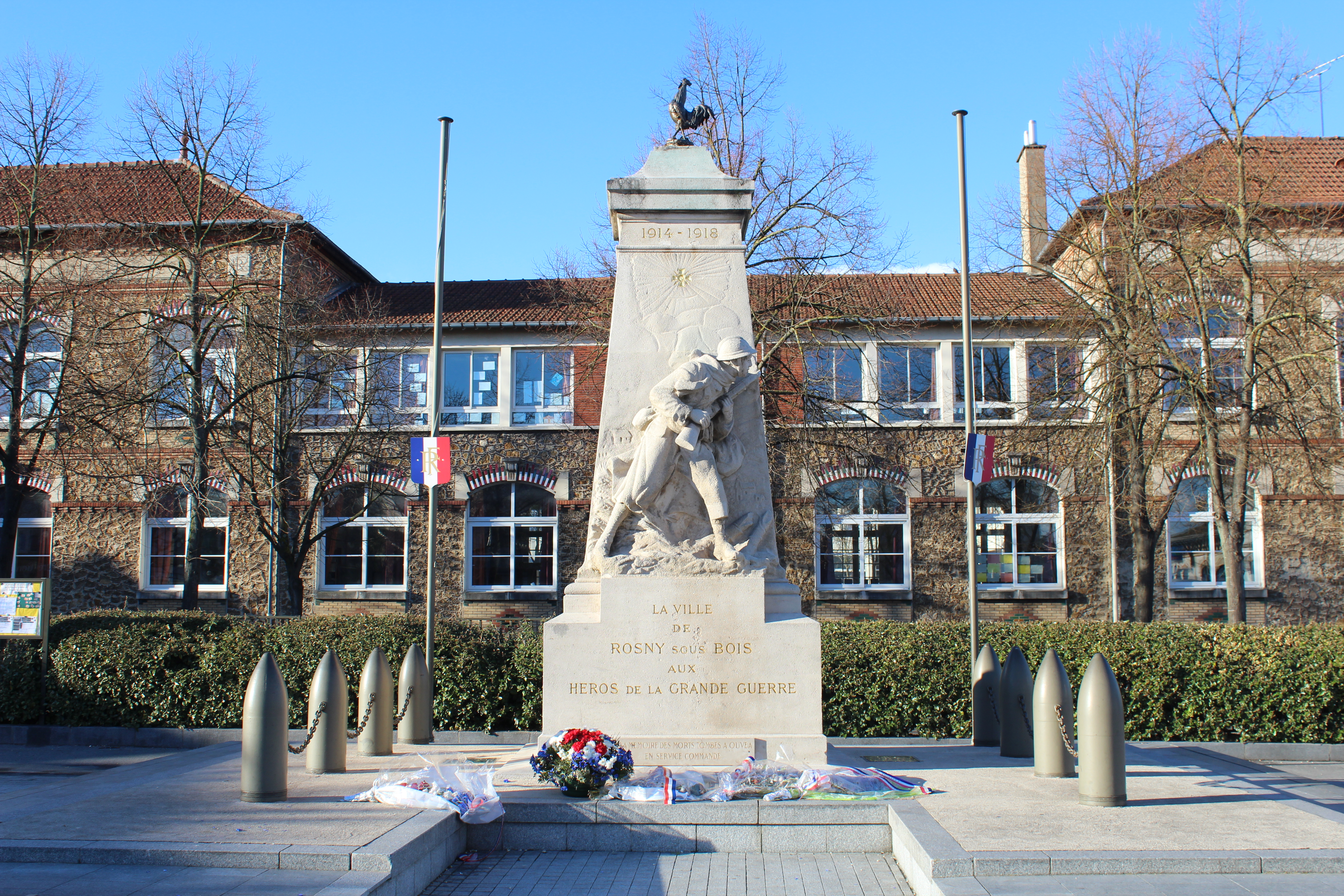 Monument aux morts de Rosny-sous-Bois.